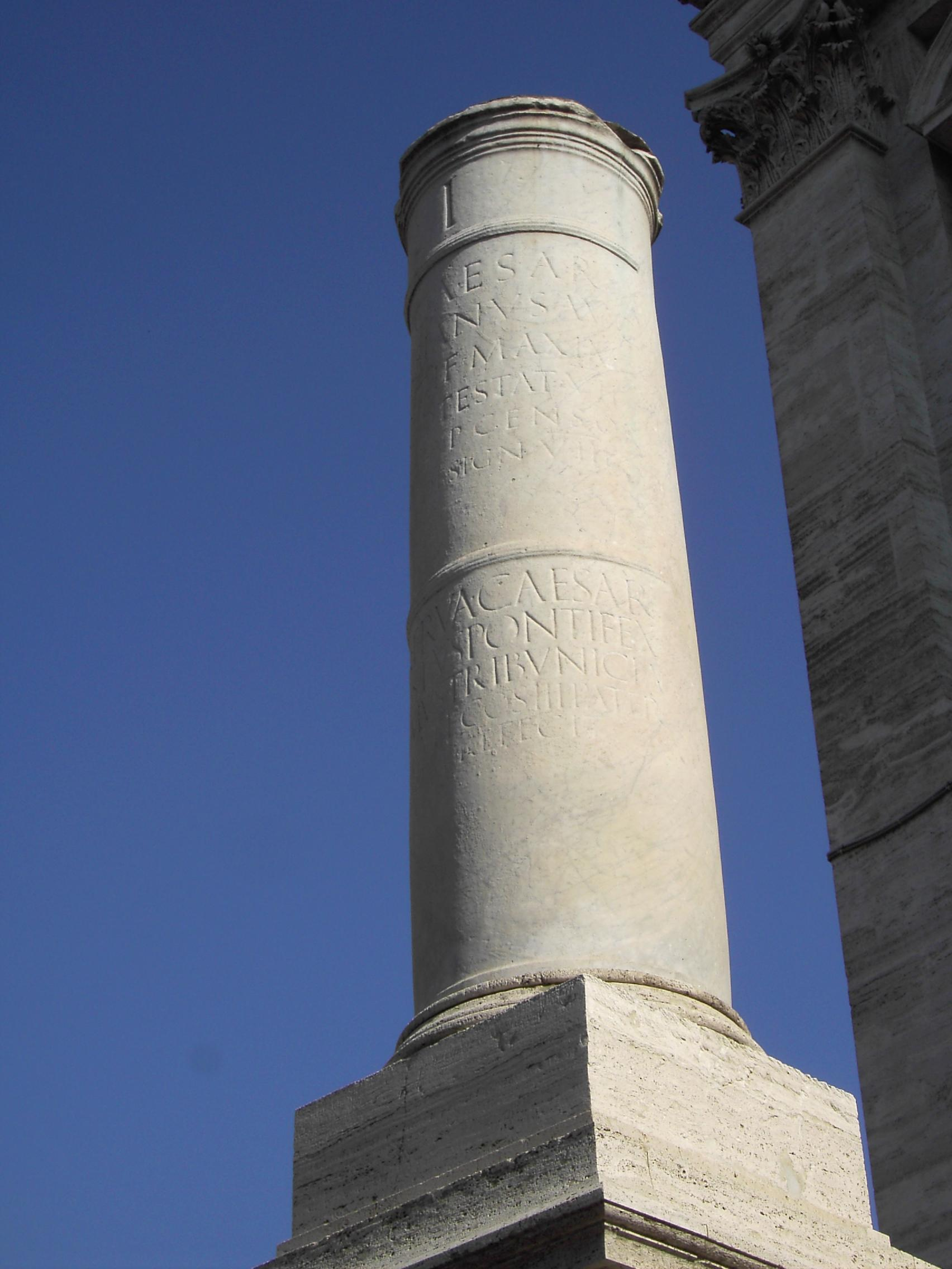 Roma, Campidoglio: il Miliarium, punto di partenza della via Appia